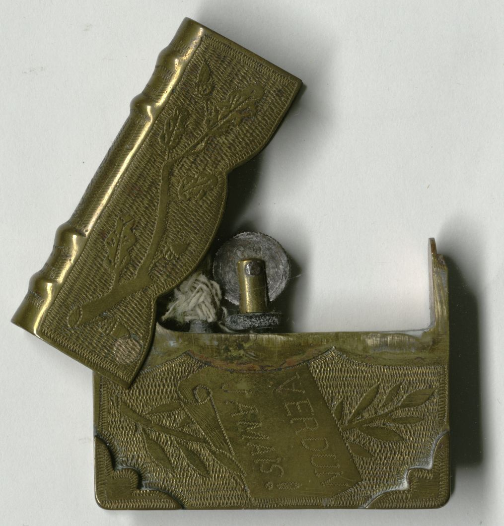 Objets d'origine inconnue réalisés pendant la Grande Guerre dans des tranchées ou dans des camps de prisonniers allemands.